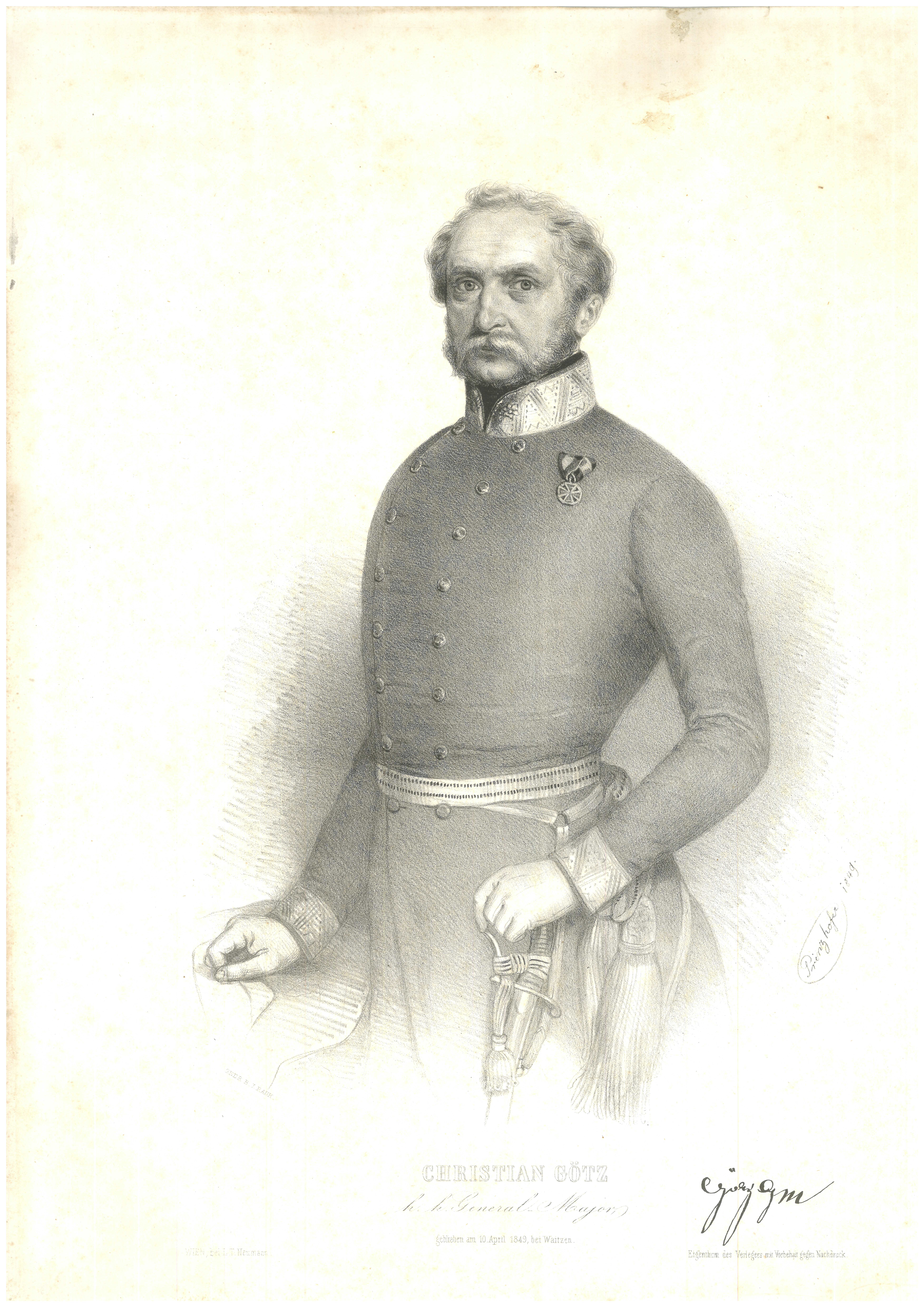 Christian Götz (1783–1849), Lithographie Christian Götz k. k. General-Major, geblieben am 10. April 1849, bei Waitzen. rechts signiert: Prinzhofer 1849, gedr. b. J. Rauh., Wien bei L. T. Neumann, Eigenthum des Verlegers mit Vorbehalt gegen Nachdruck.